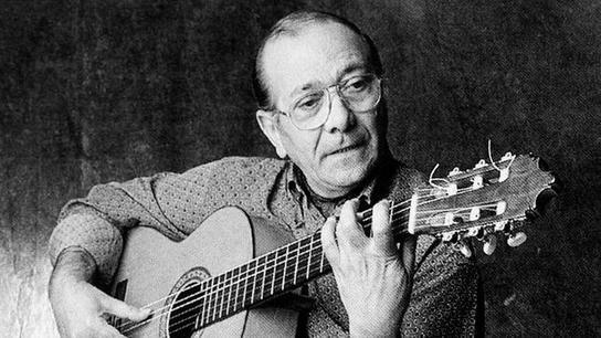 Juan Habichuela - flamenco guitarist